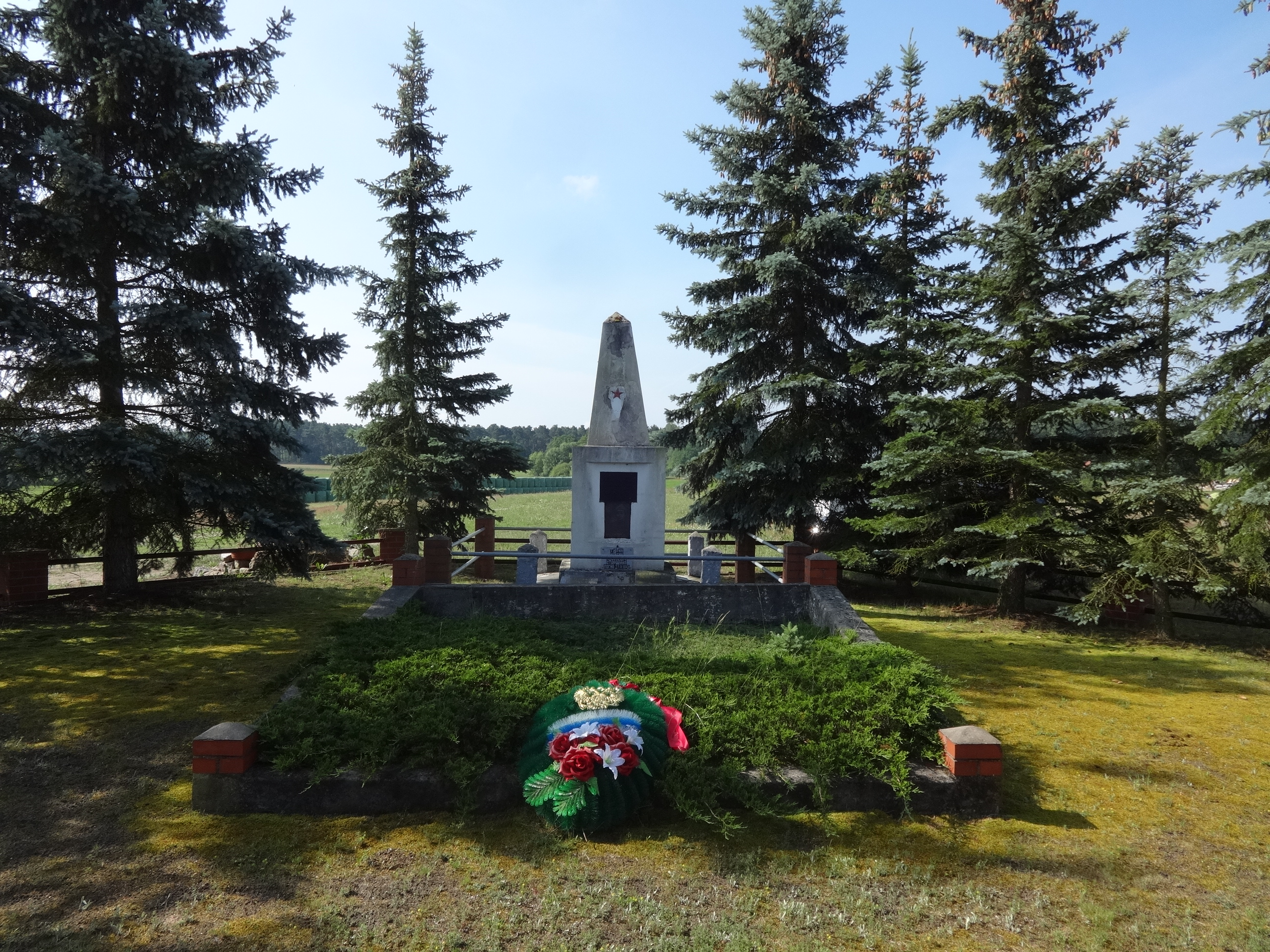 Impression aus Freidorf, ein Ortsteil der Gemeinde Halbe im Landkreis Dahme-Spreewald in Brandenburg